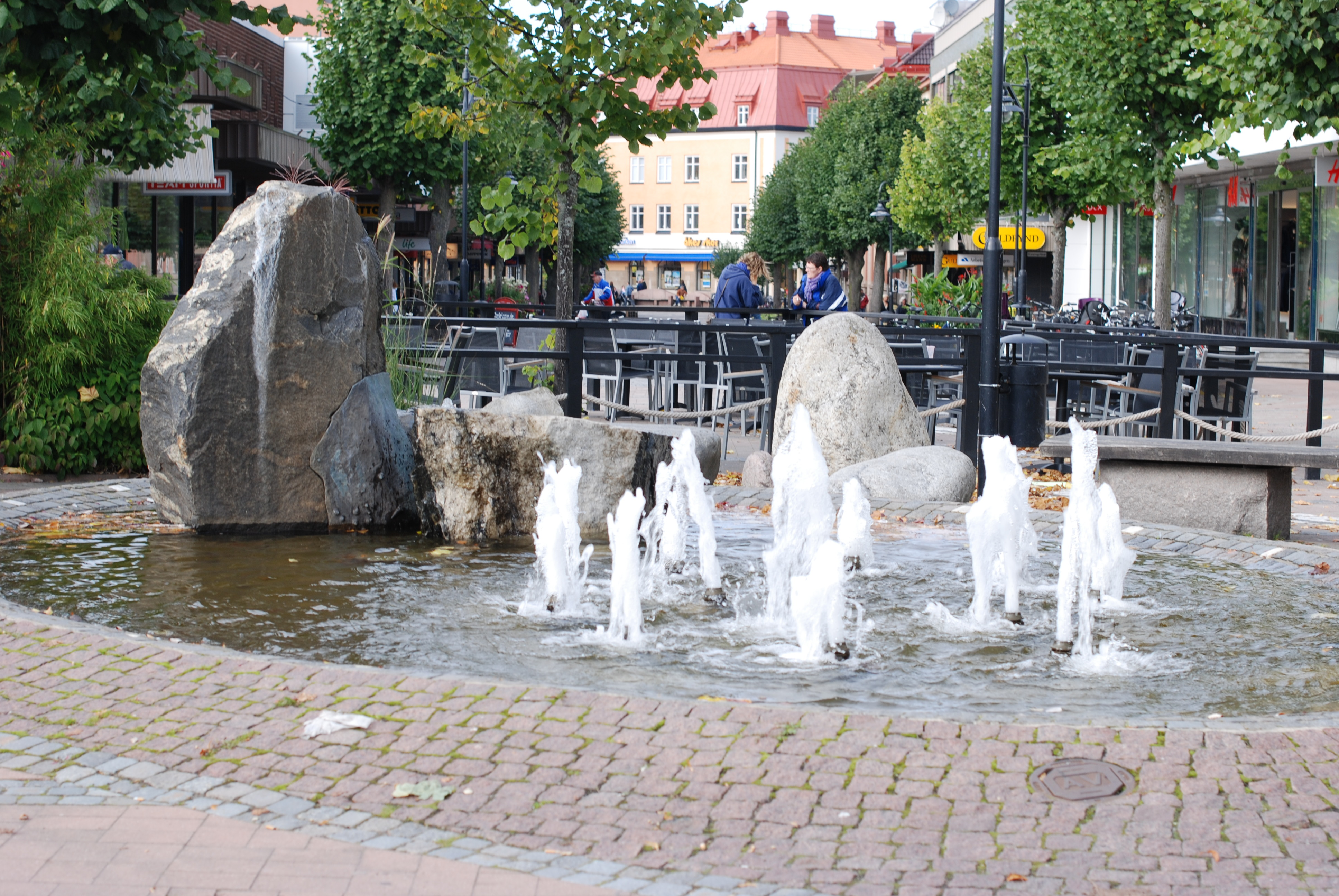 Part of Uta Jacobs´ sculptural work Bäcken rinne åter längs Köpmangatan in Katrineholm, Sweden